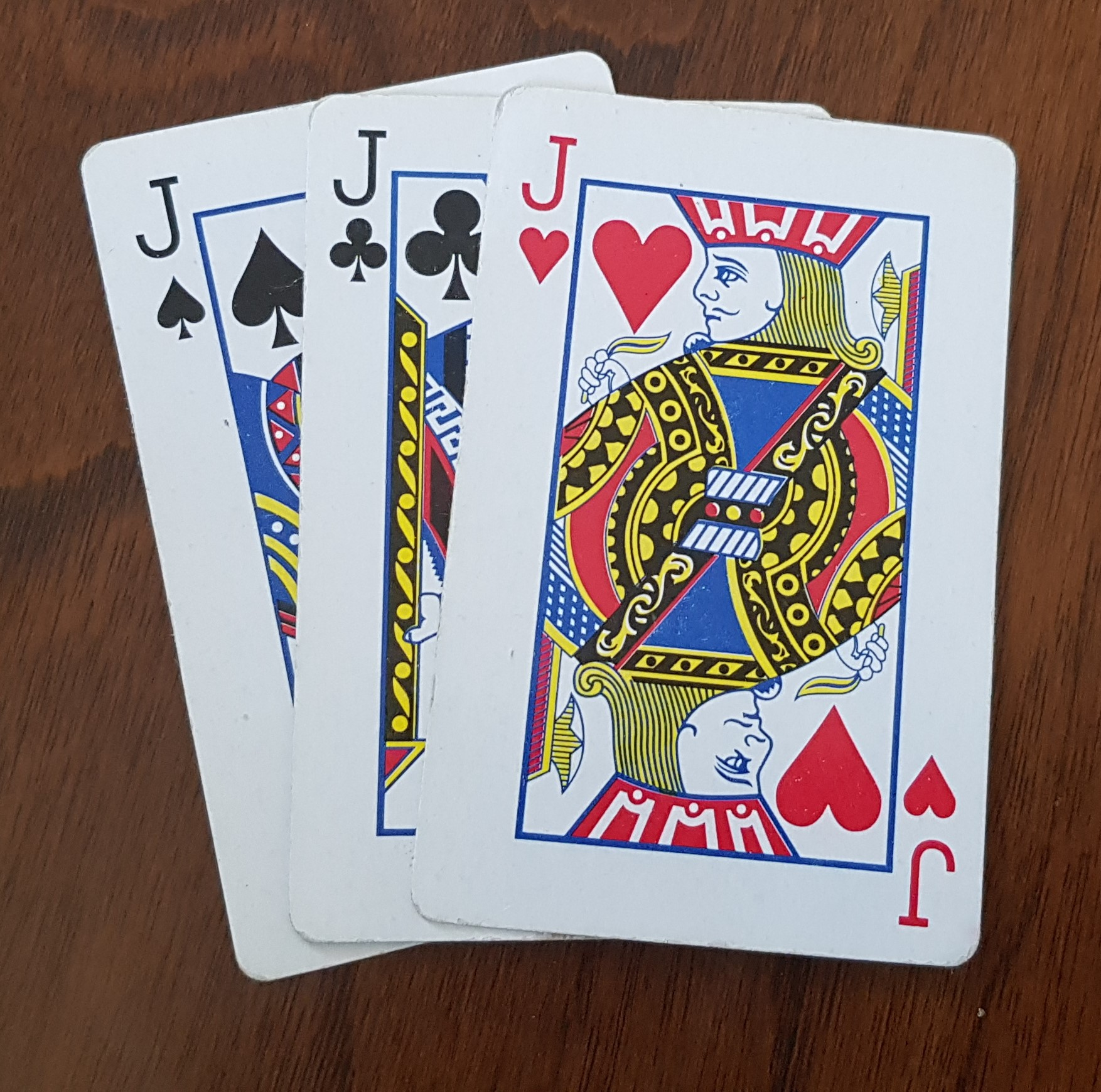 Chlust z 3 tych samych figur.